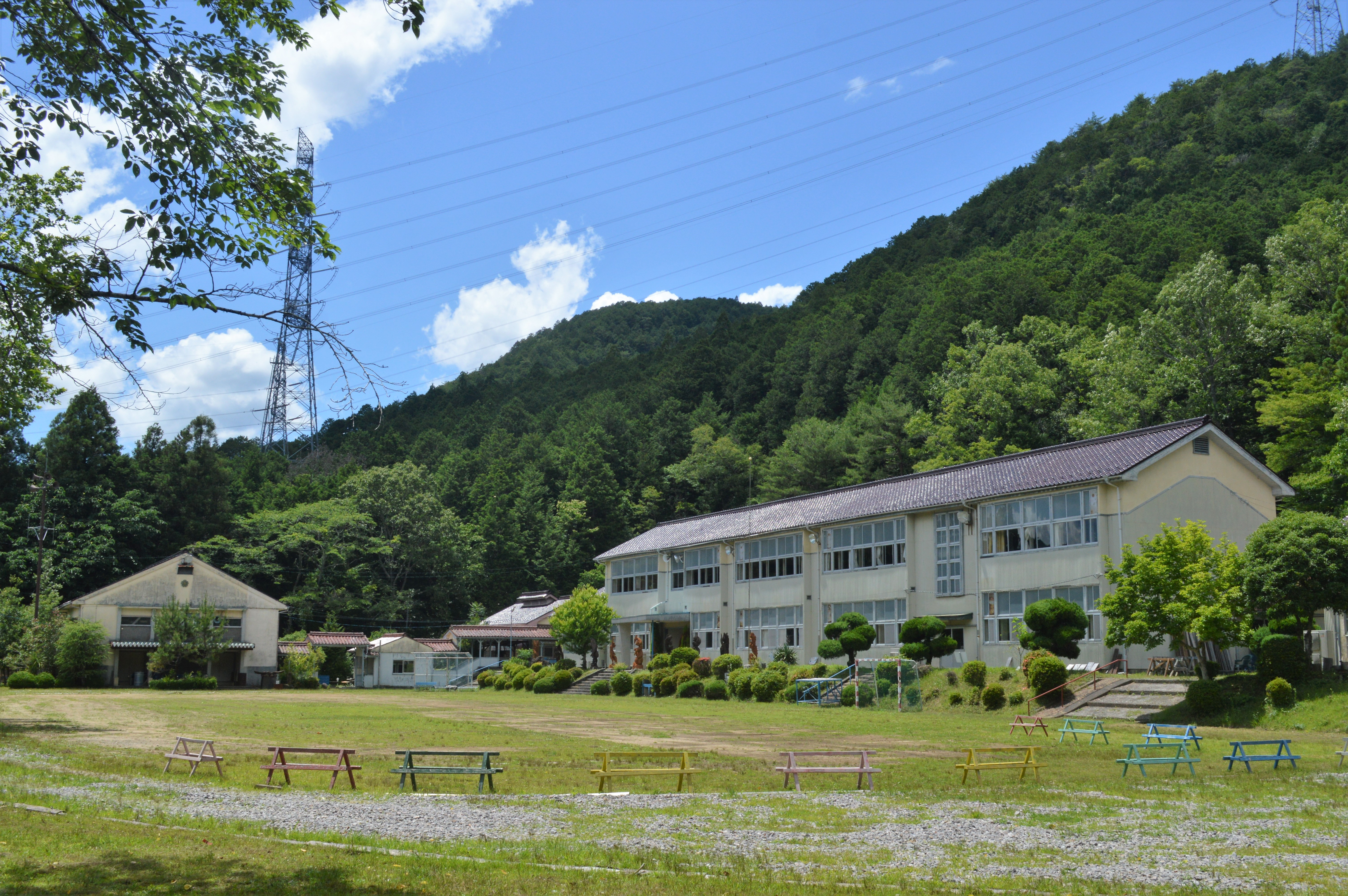 愛知県北設楽郡東栄町の体験交流施設「のき山学校」。旧・東栄町立東部小学校。